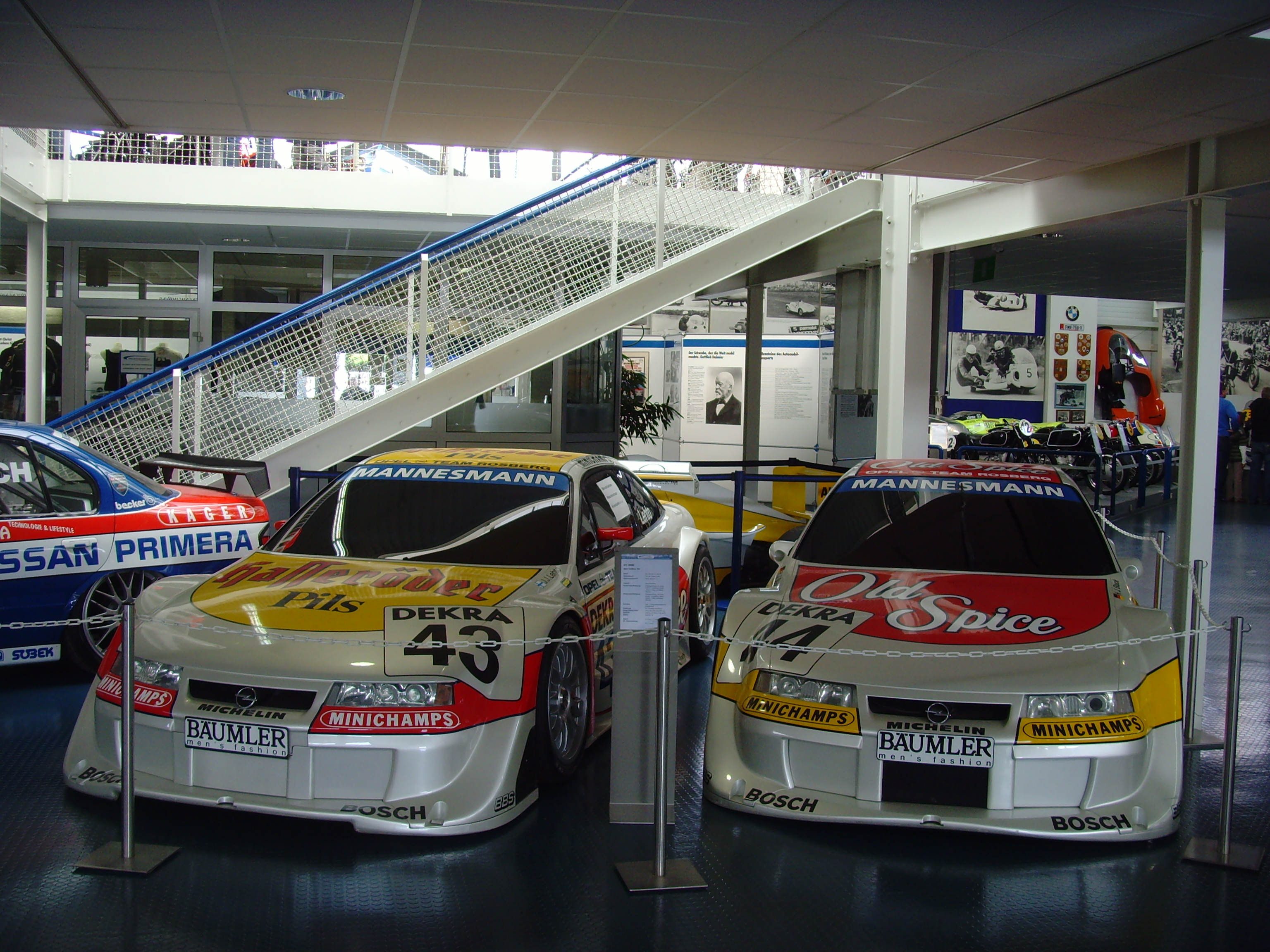 Hockenheimring - Motor-Sport-Museum